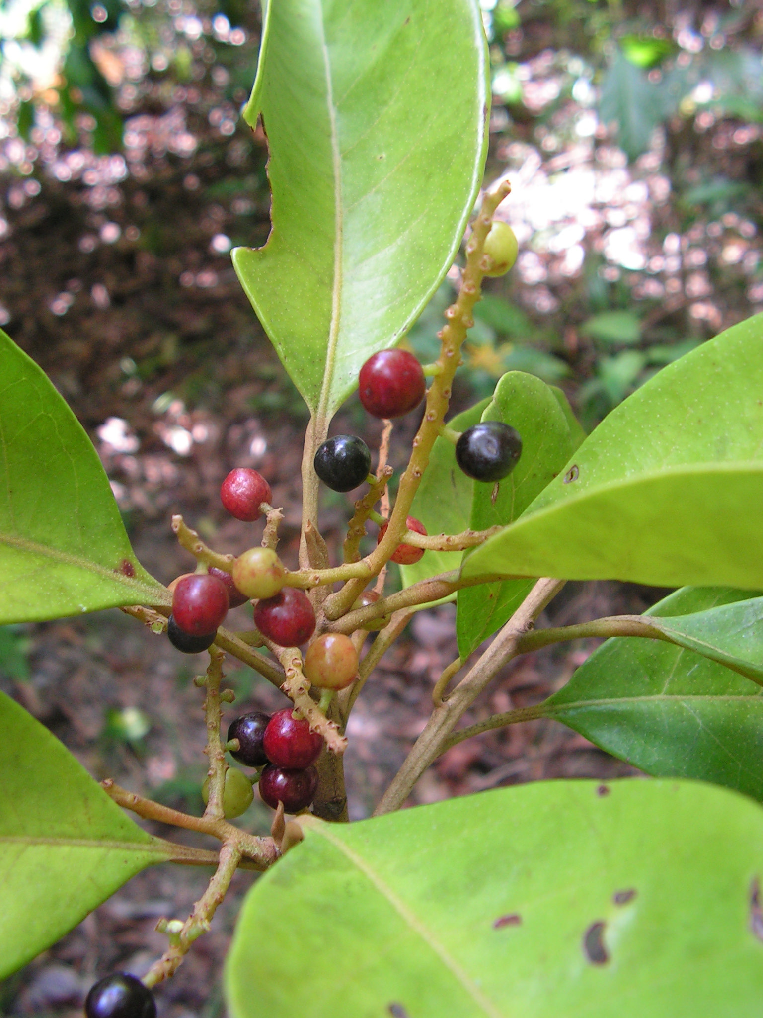 Phyllanthaceae - Hieronyma alchorneoides Allemão - jerimum - árvore - floresta ombrófila densa - ZPEC-Suape, Cabo de Santo Agostinho, Pernambuco